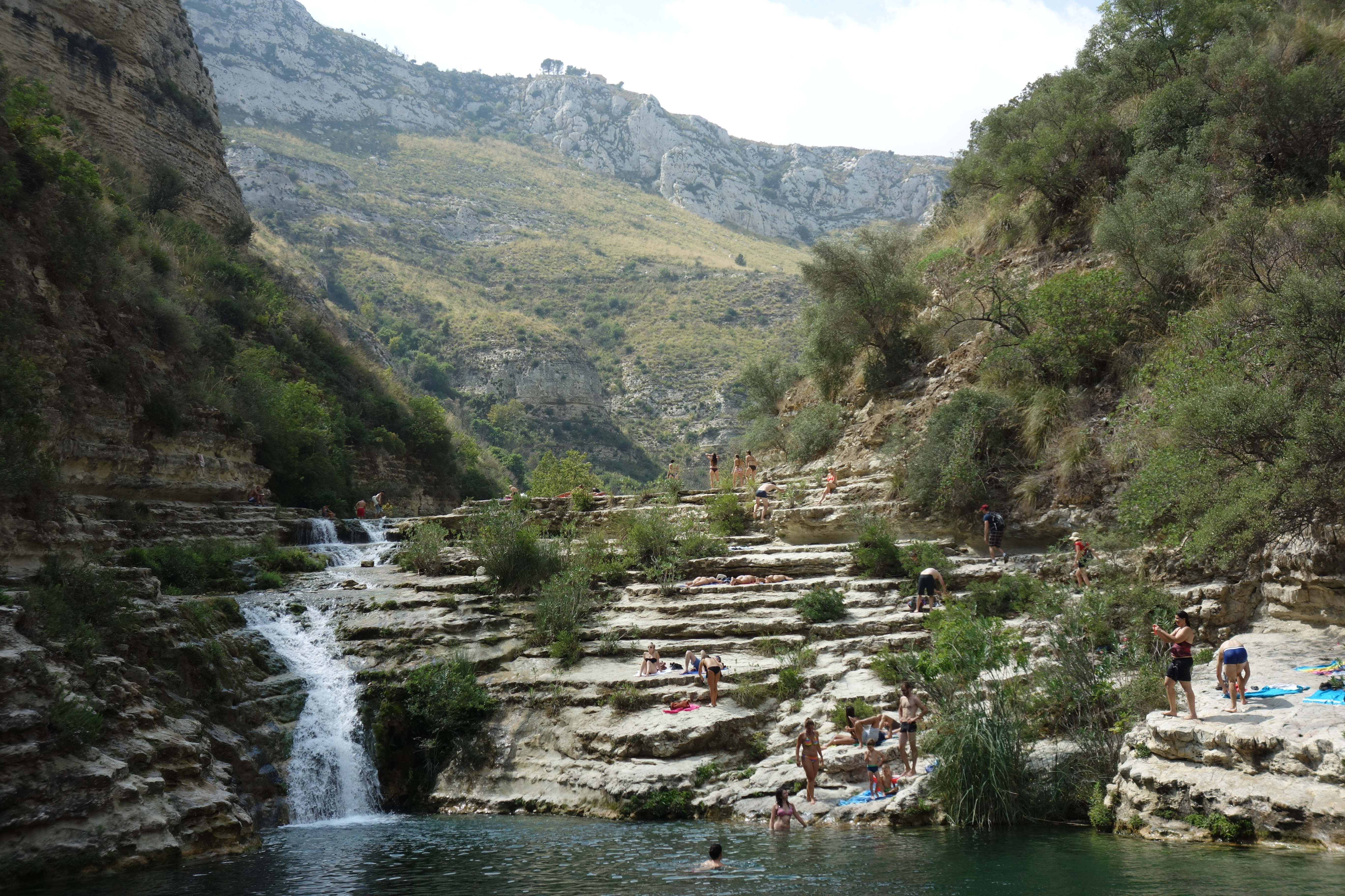 Cavagrande, Cassibile, Avola, SR